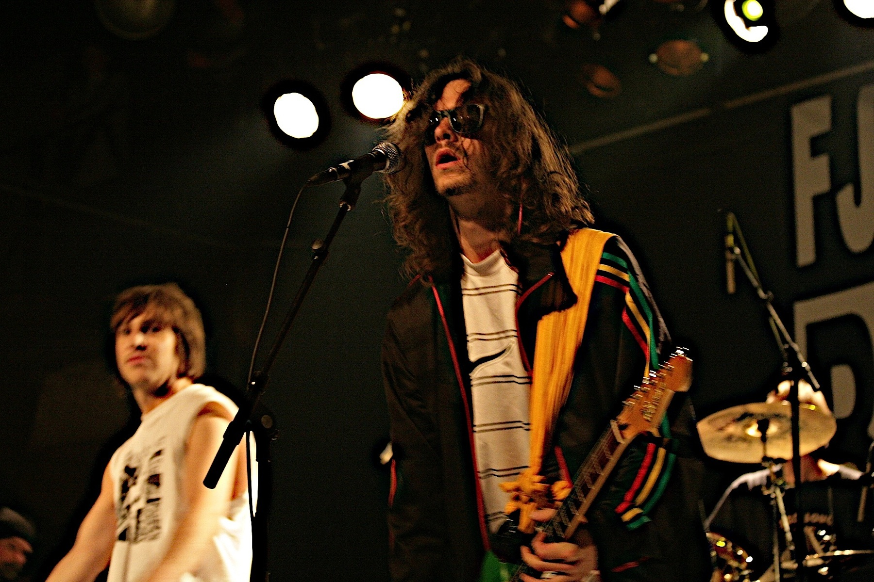 Fjorden Baby!